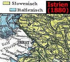 Dettaglio estrapolato da File:Istria (ethnic).JPG già presente in Commons (inserito da utente Alex:D in data 7/11/2009